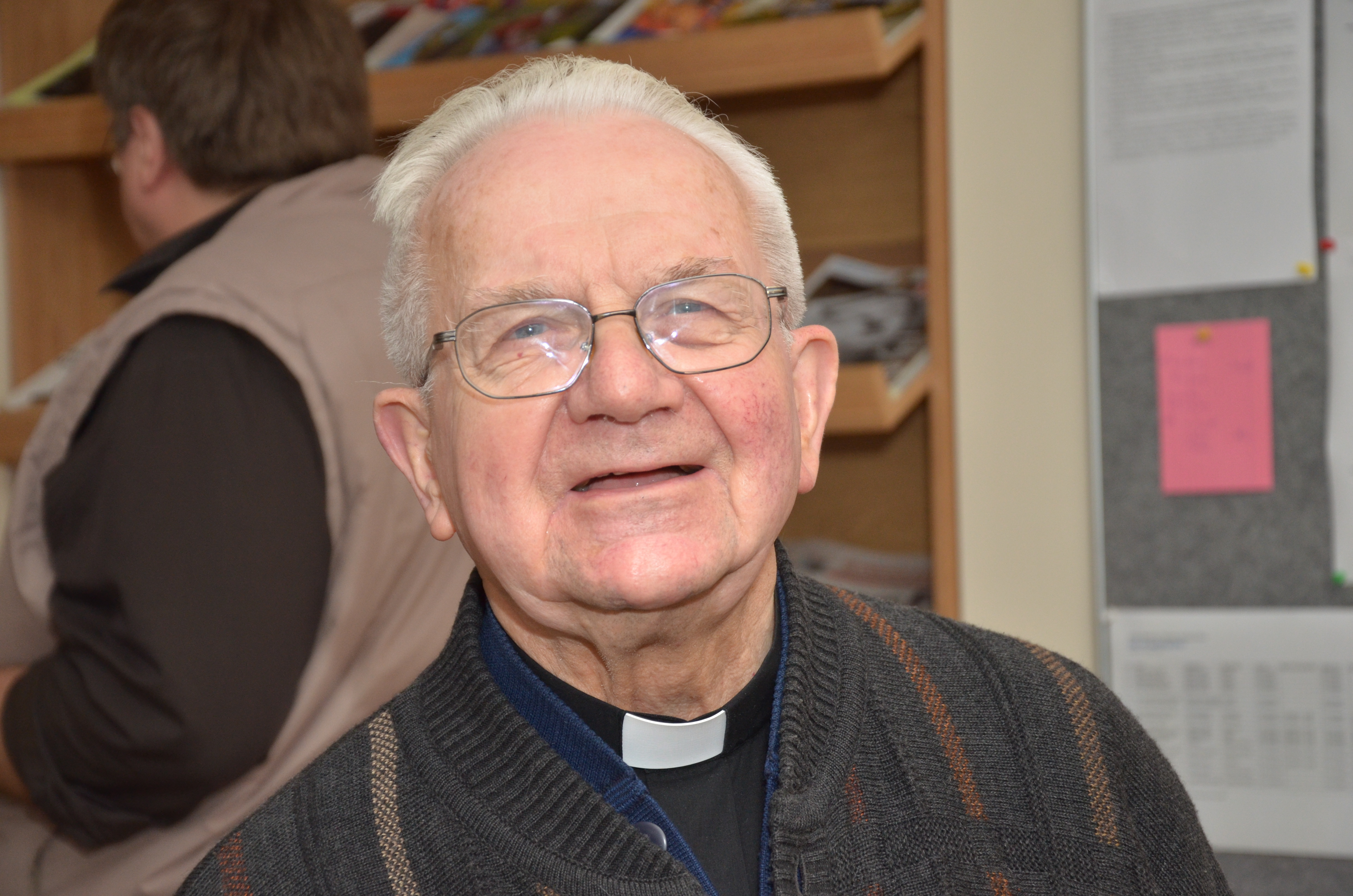 O. Alfons Kupka OMI